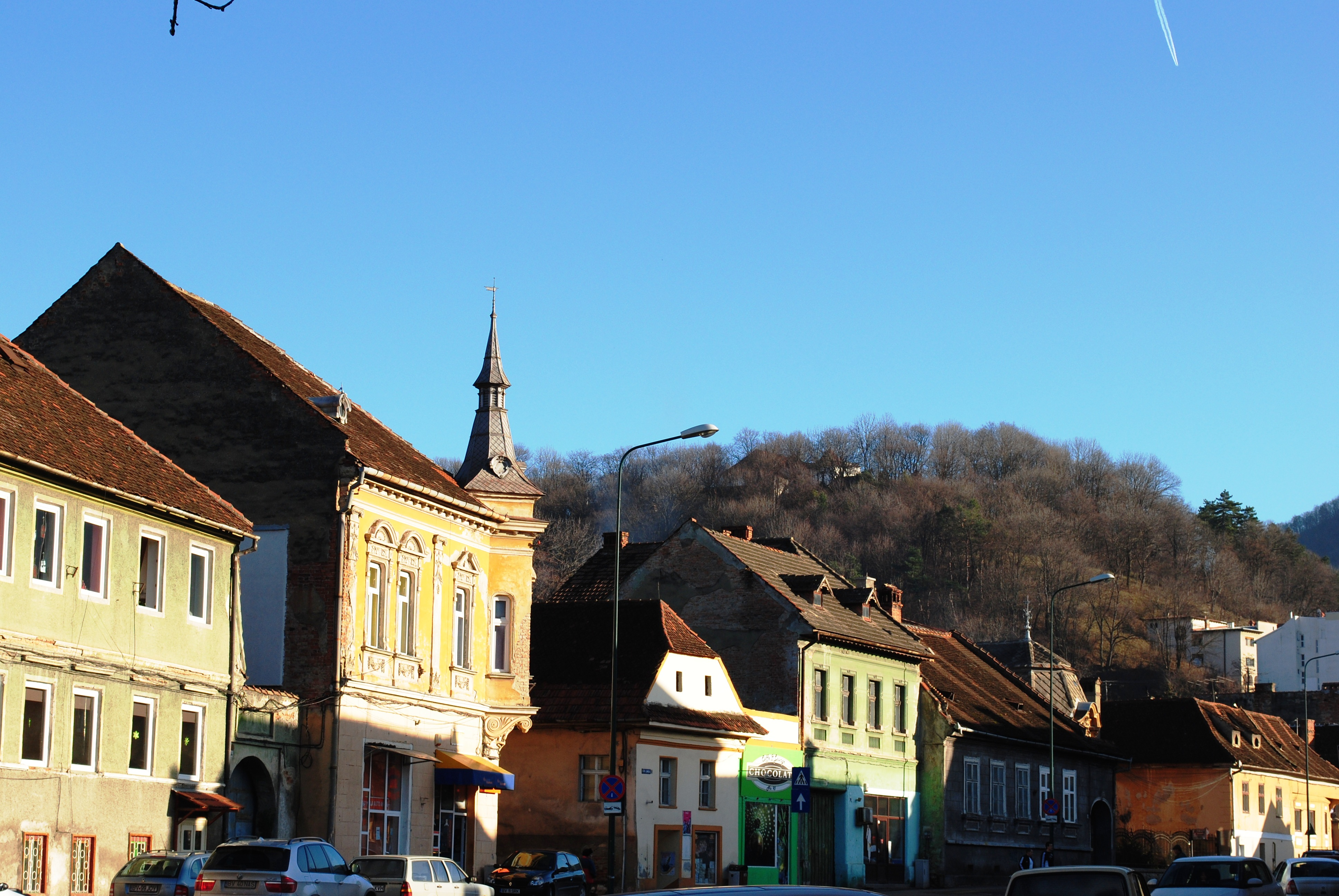 Ansamblul urban "Brașovul Vechi" sec. XVIII - XX